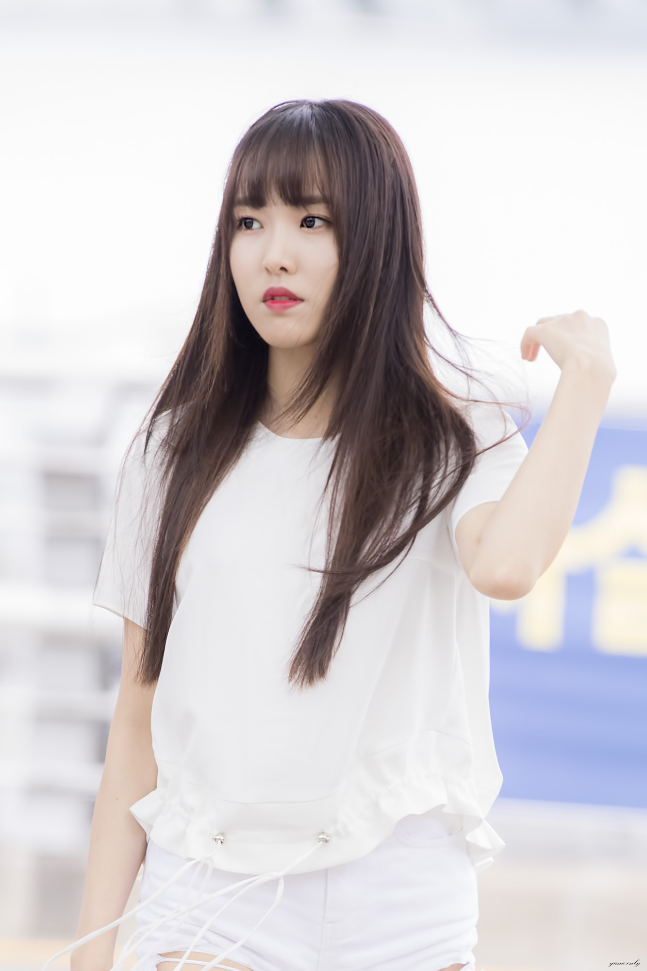 2017년 7월 15일 인천공항 출국 유주